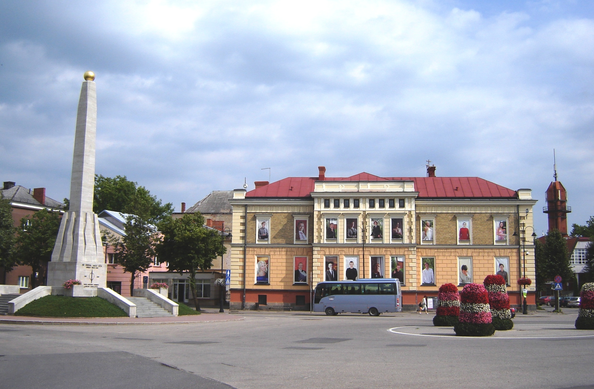 Stadtzentrum von Cesis